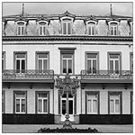 Villa Marie-Henriette Spa 01.2006.jpg